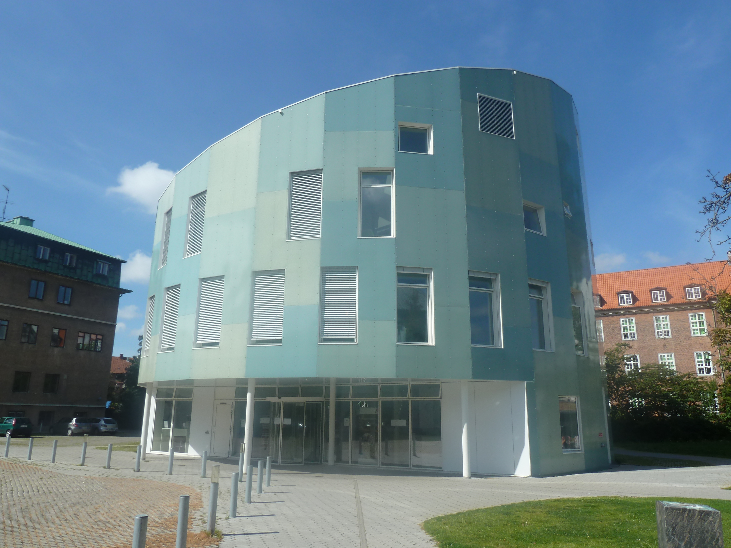 Green Light House in Universitetsparken in Østerbro, Copenhagen.